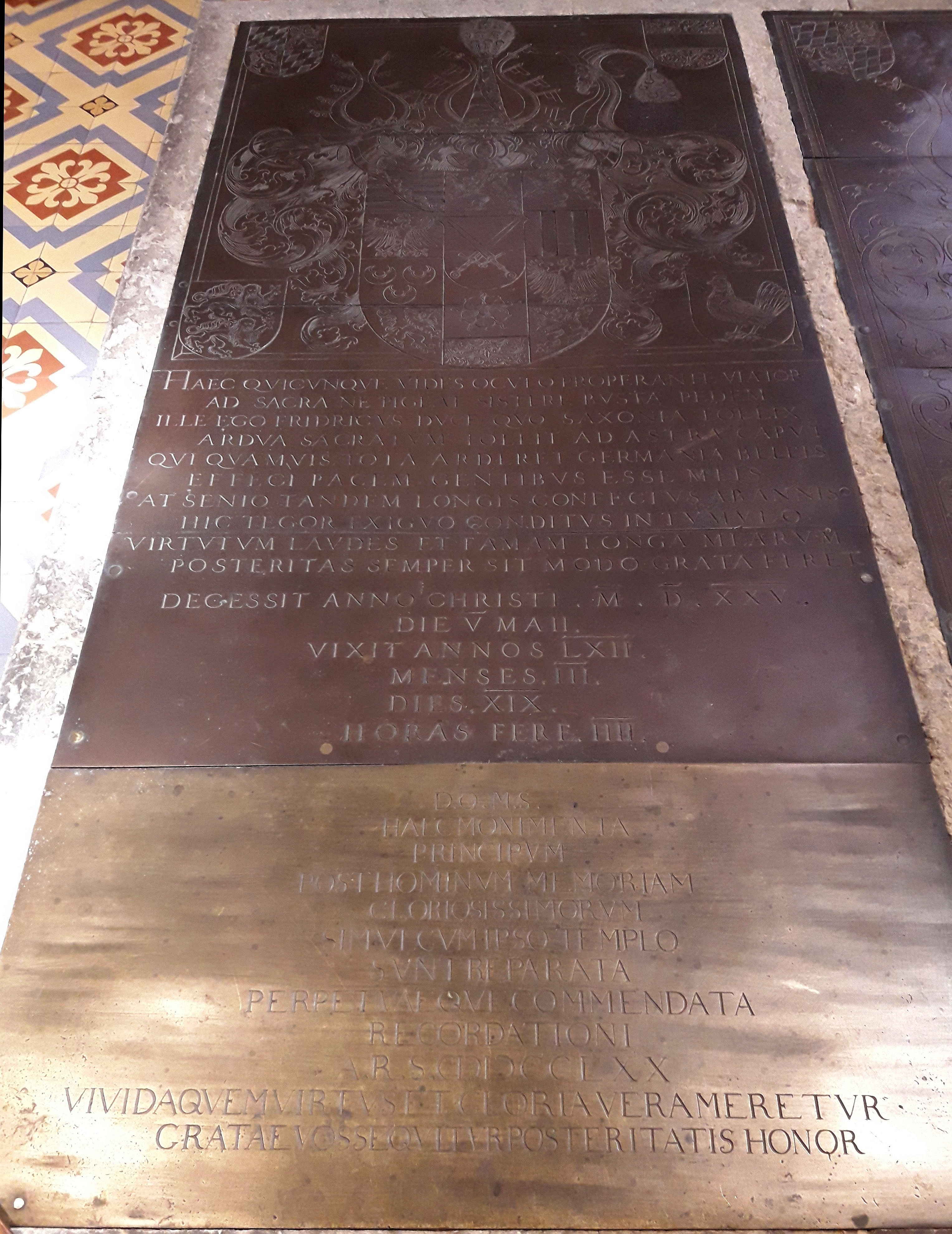 Grab des Kurfürsten Friedrich III. von Sachsen vor dem Hauptaltar in der Schlosskirche Wittenberg